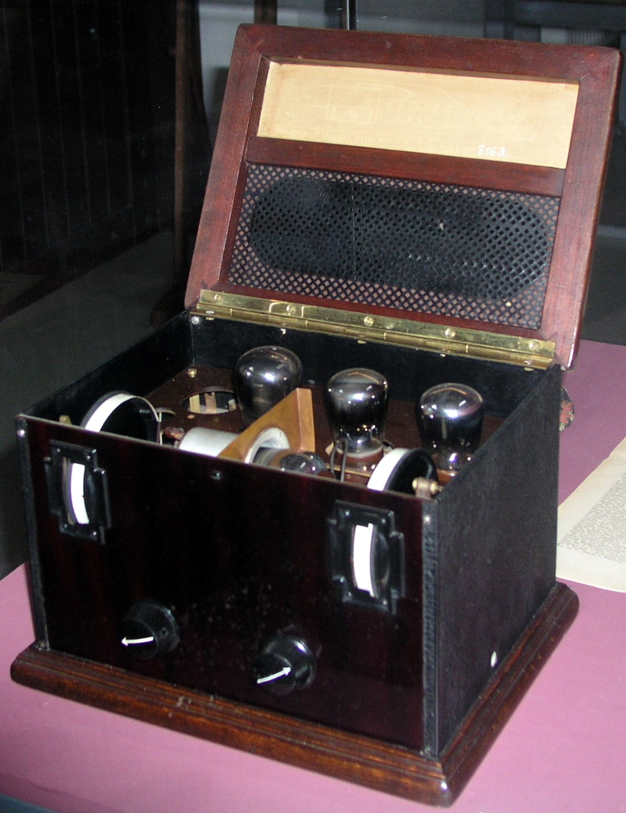 Radio "4LS", manufacturer: "Marconi Polska", 1929